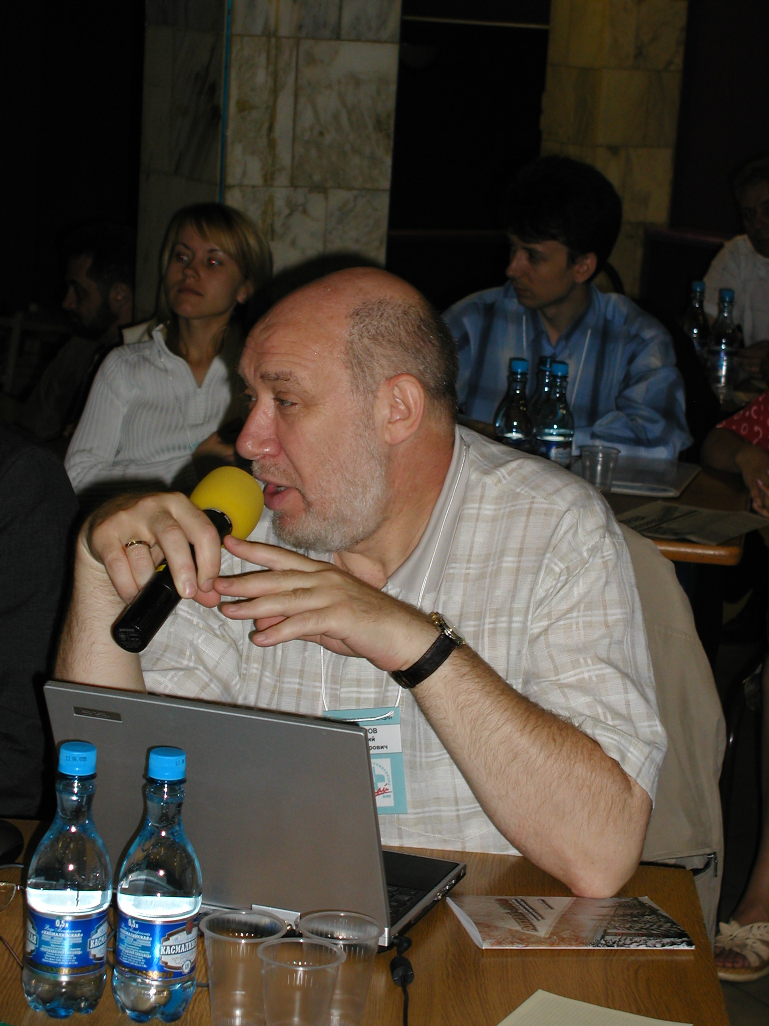 Сатаров Георгий Александрович на конференции Алтай 2005.